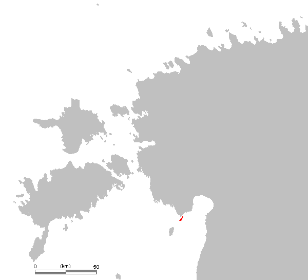 Manilaid